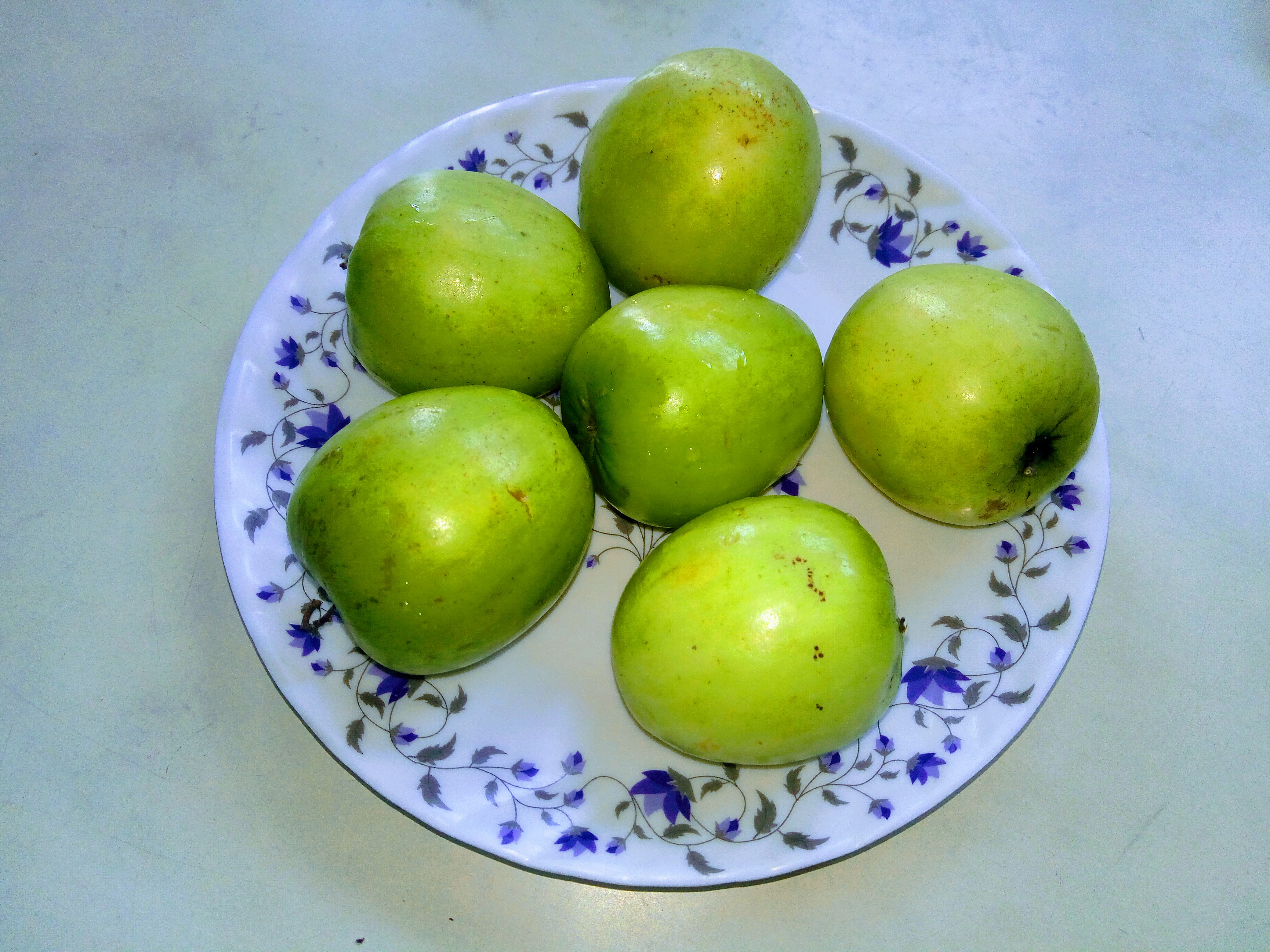 बेर की एक हाइब्रिड प्रजाति